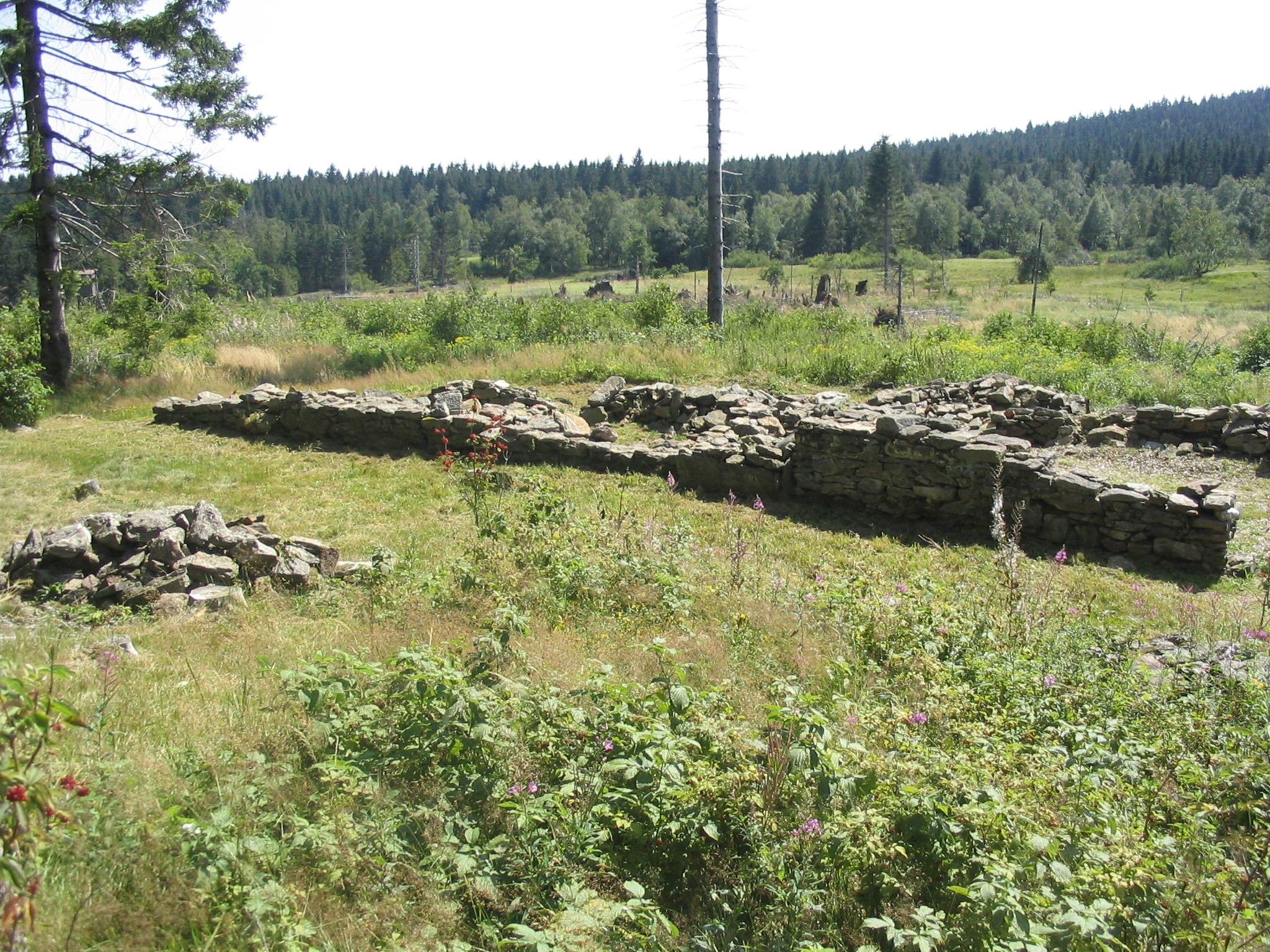 Grundmauern der aufgegebenen Gehöfte von Oberbreitenau, aufgenommen am 02.08.2007 von Dr. Hagen Graebner